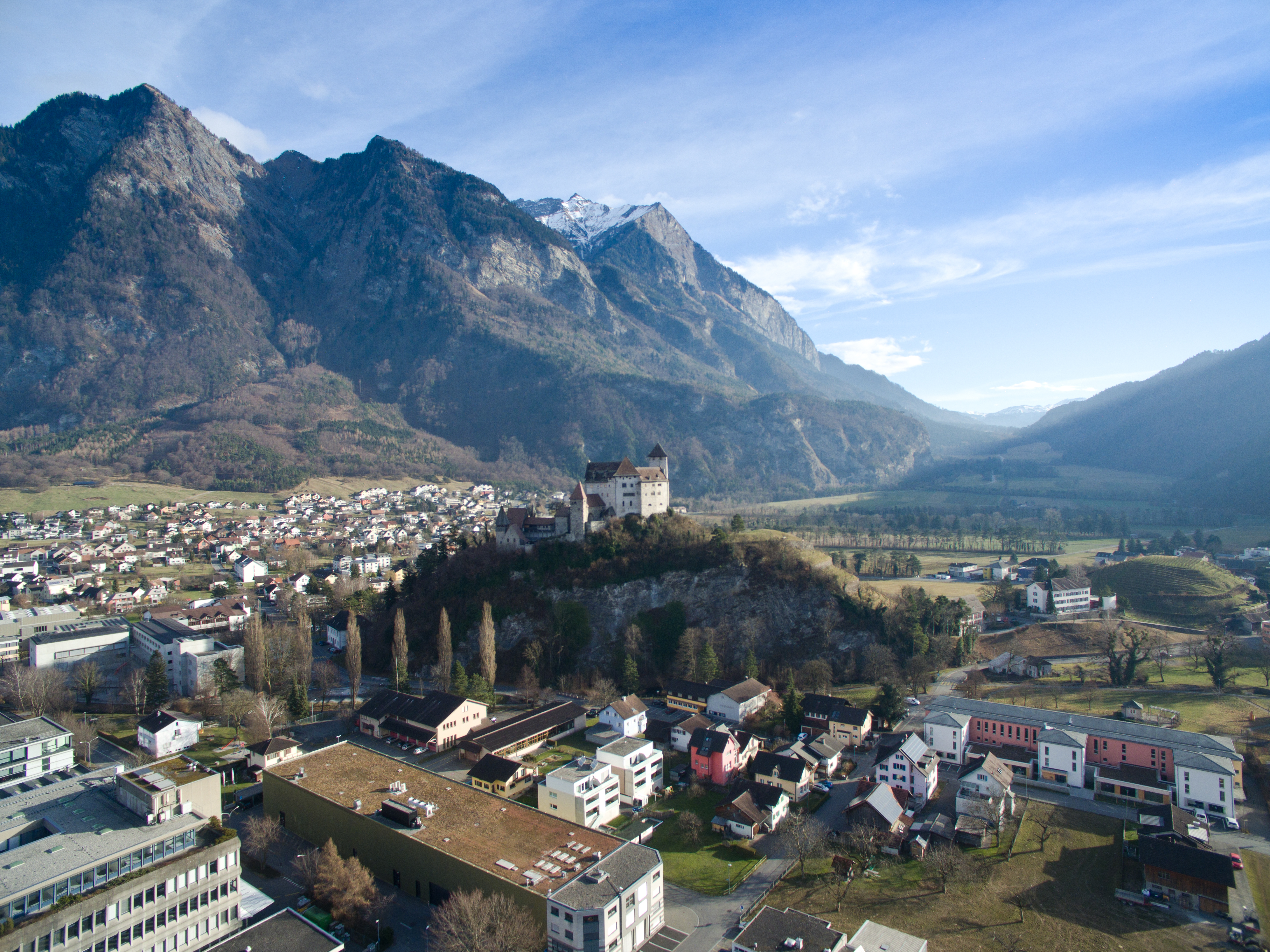 Die Burg Gutenberg in Balzers, Liechtenstein.